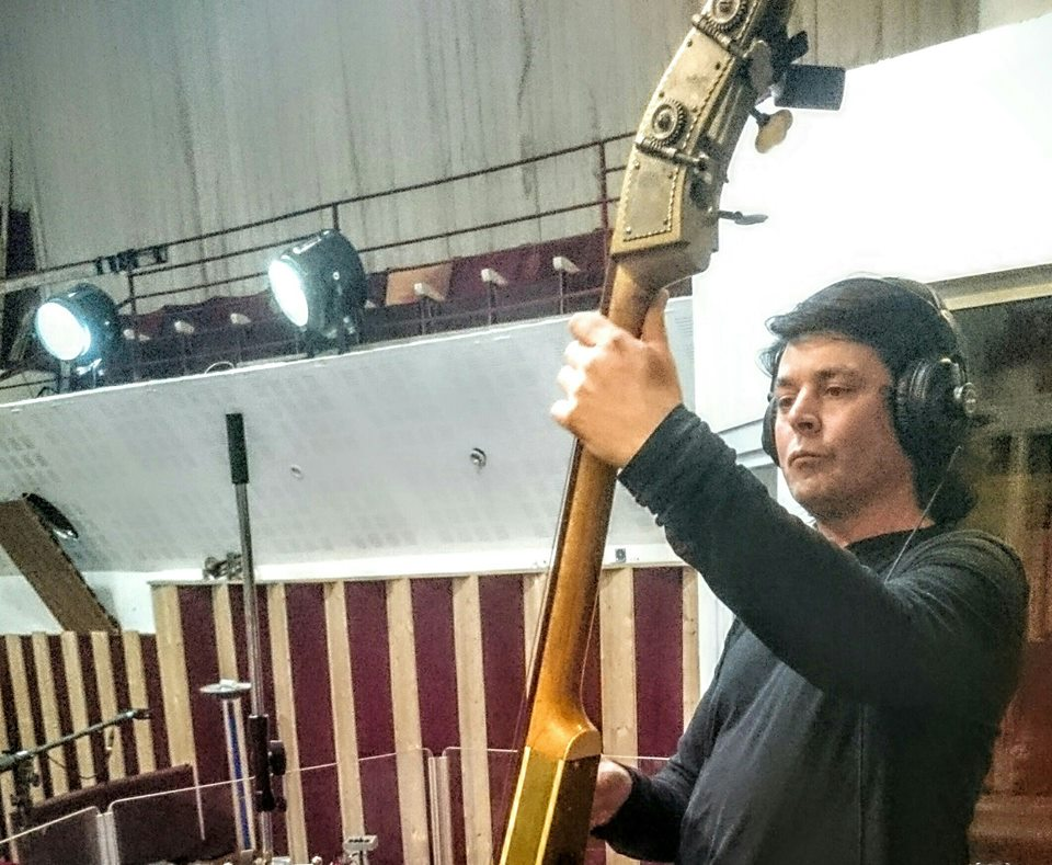 Richard Puaud à la contrebasse